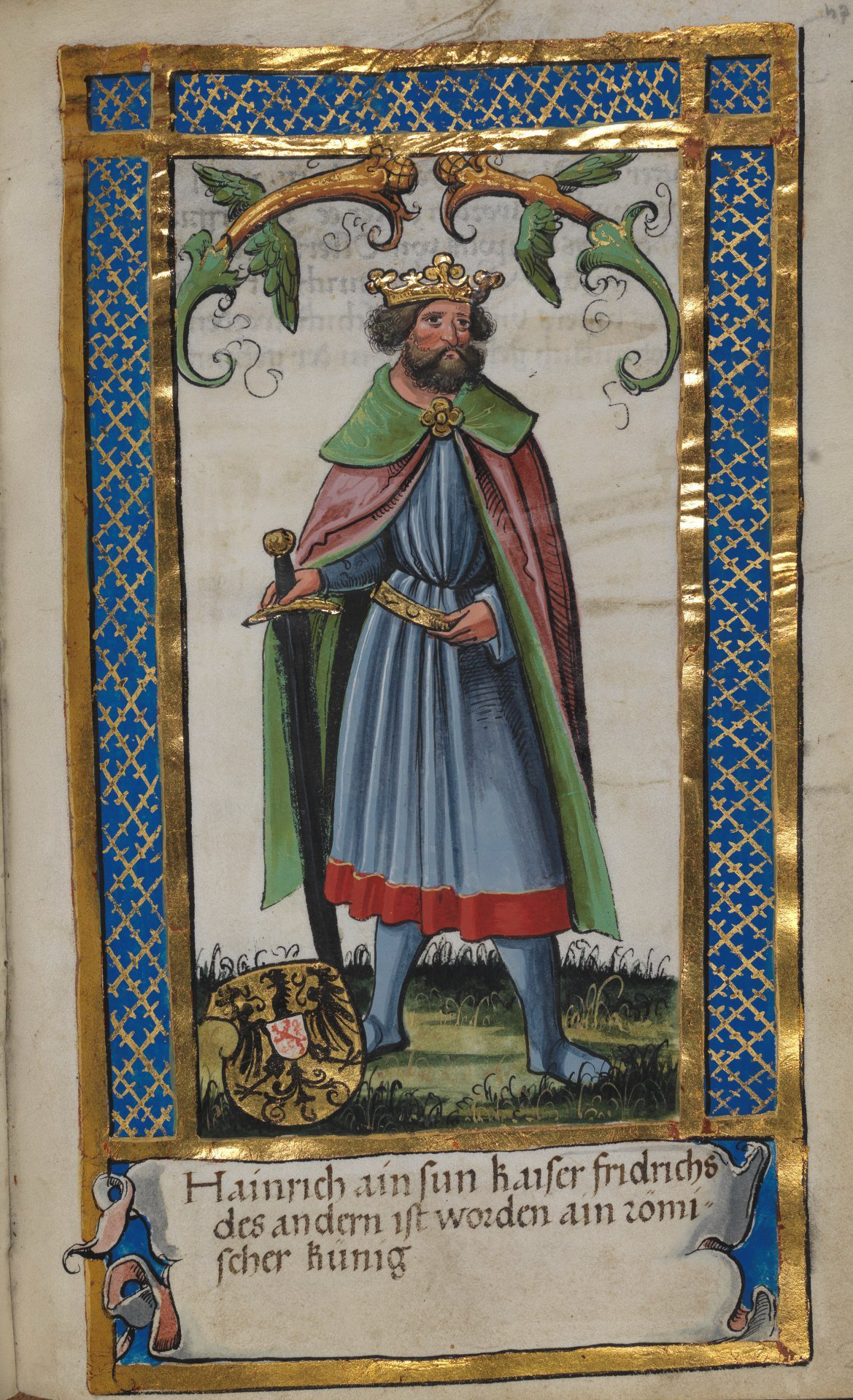 Weingartener Stifterbüchlein, Württembergische Landesbibliothek Stuttgart, Cod.hist.qt.584, fol. 47r, Stifterbild König Heinrich (VII.) Hainrich ain sun kaiser fridrichs des andern ist worden ain römischer künig